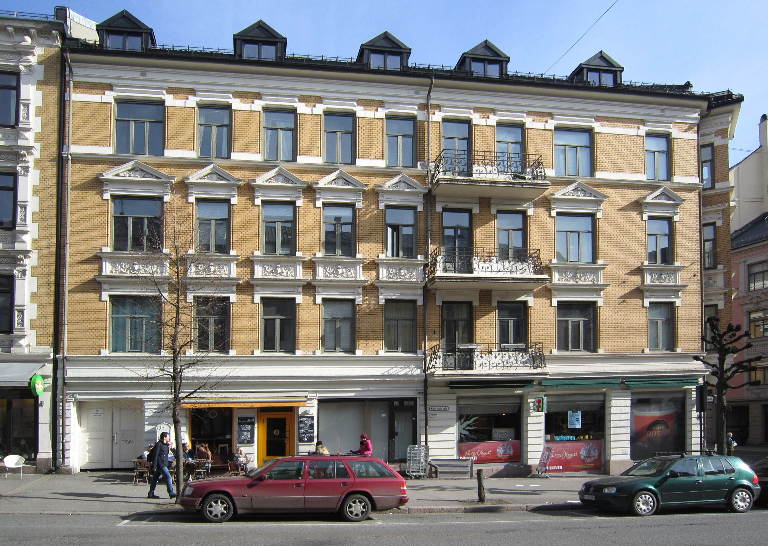 Niels Juels gate 29